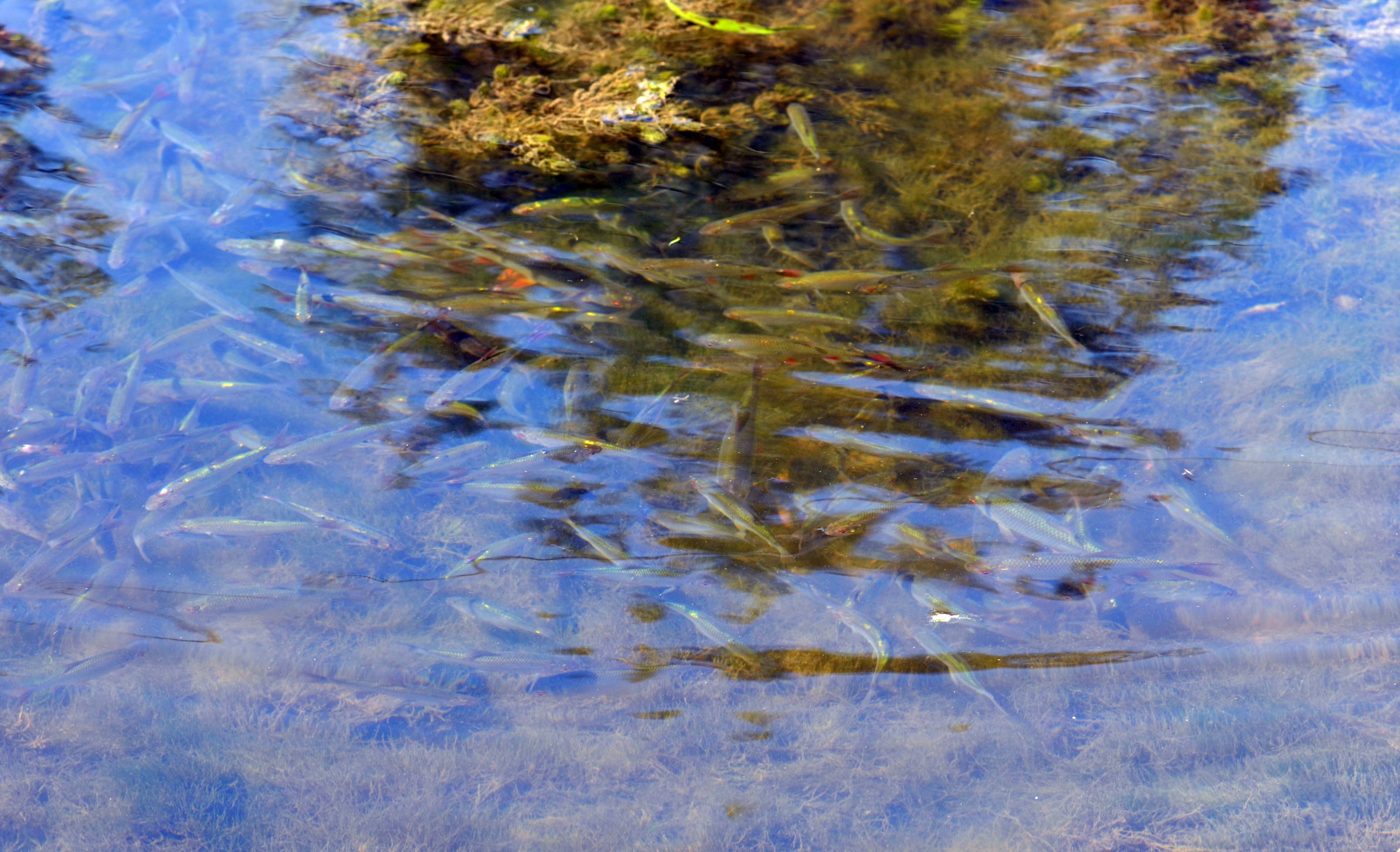 Rassemblement dense de gardons, observé à Lille, dans le Fossé qui ceinture la Citadelle de Vauban, 2011-08-1, sur une zone faisant l'objet d'une restauration écologique par pâturage. Cette eau était autrefois couverte de lentilles et eutrophe. Les gardons y sont nombreux en dépit de la présence constante de hérons. Quelques épinoches sont aussi présentes.